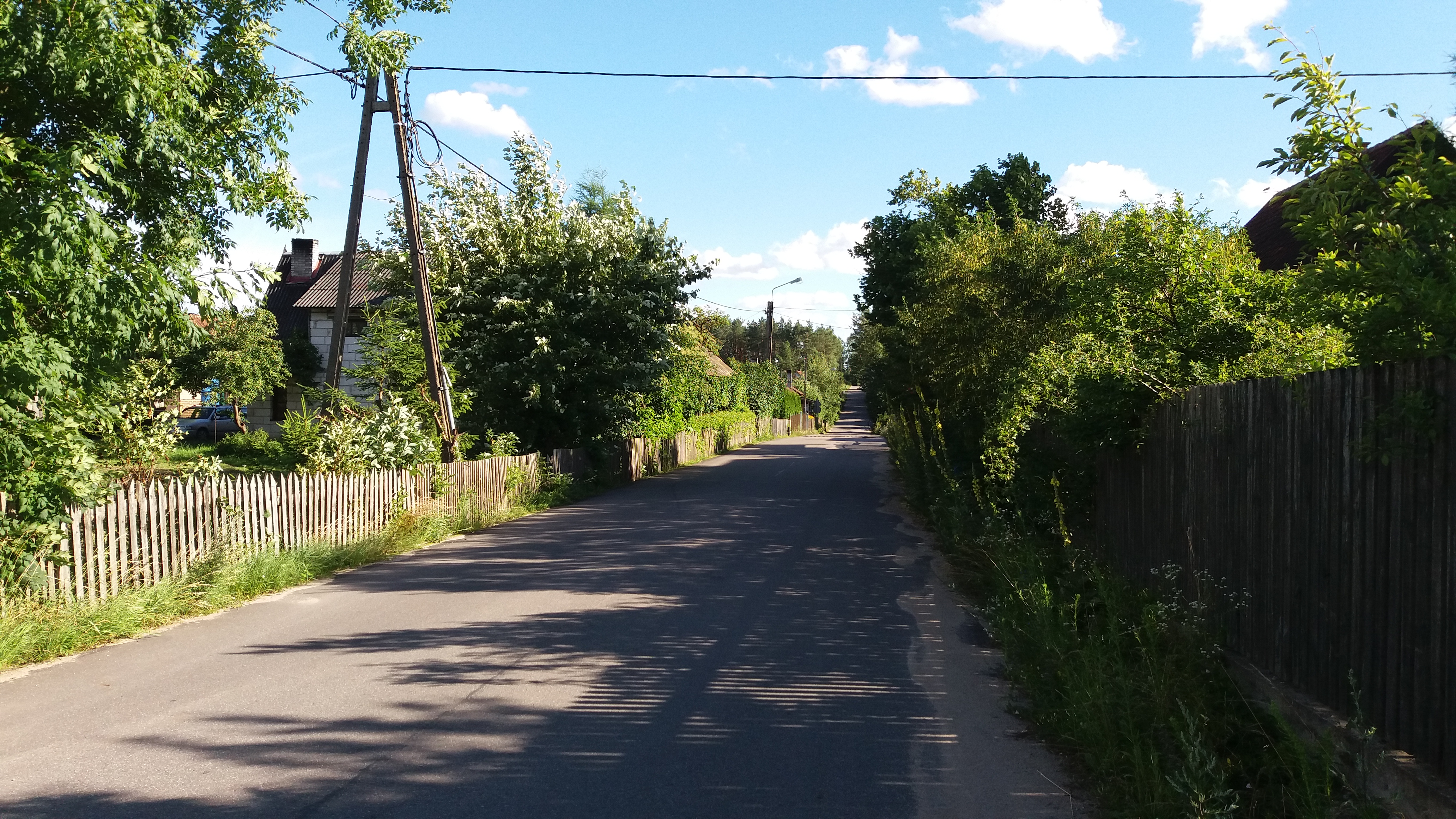 Droga przez wieś - od strony Zgonu